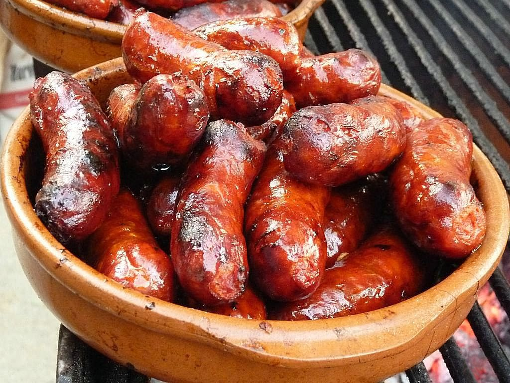 Chorizos asados a la brasa, en Galicia (España)